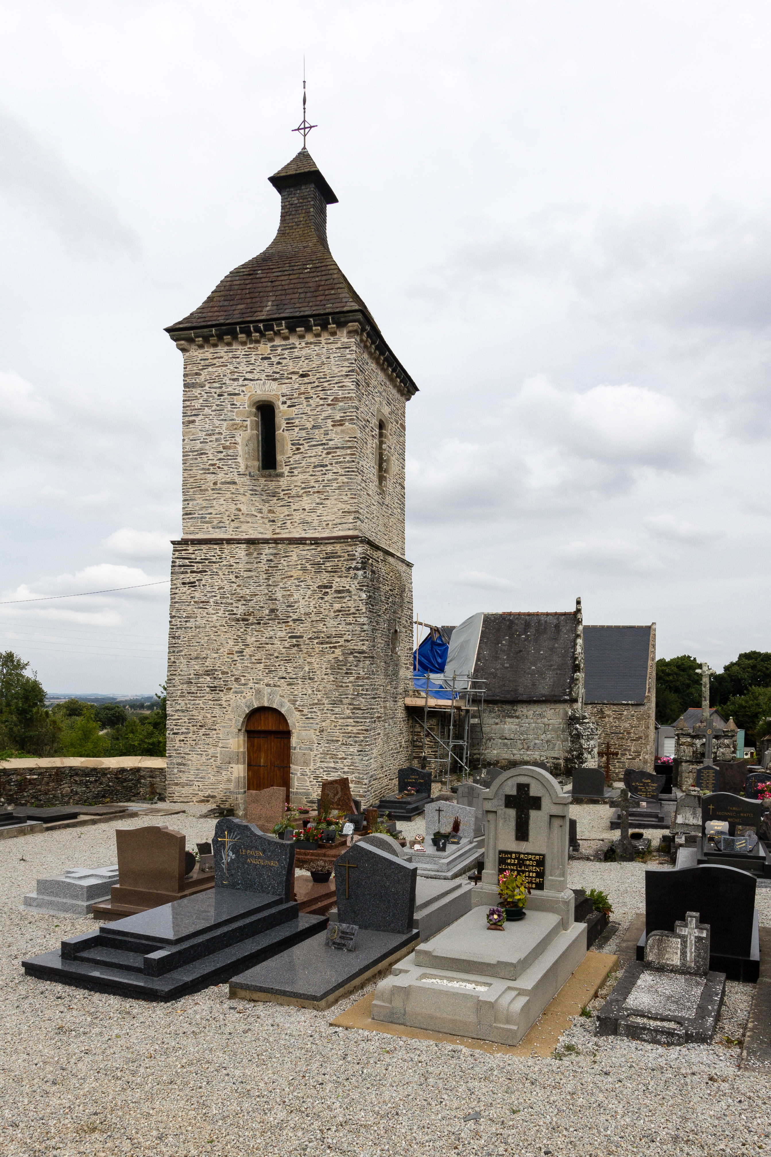 Clocher de la chapelle Notre-Dame (Rosquelfen, Laniscat, France).